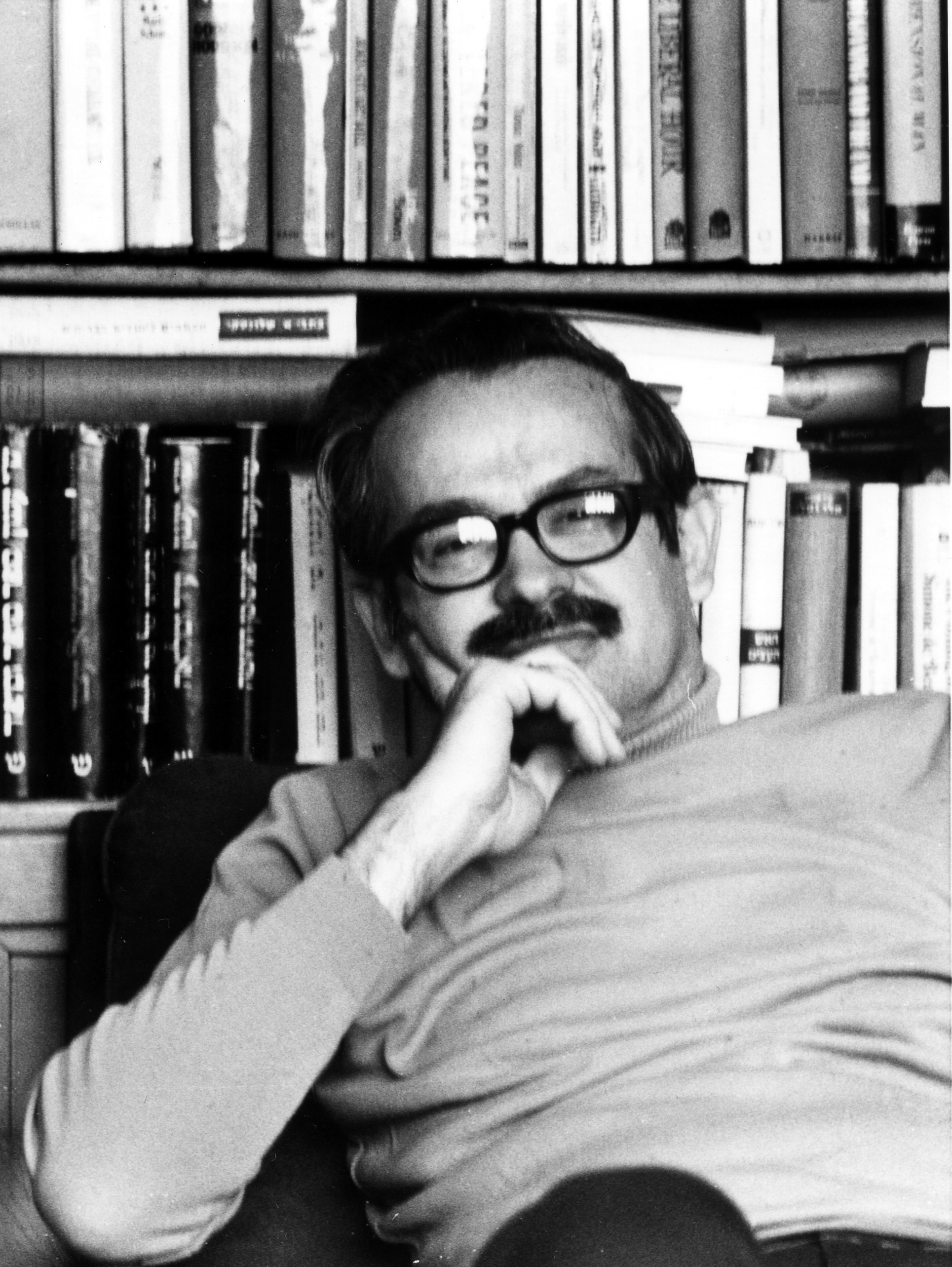 דוד פדהצור